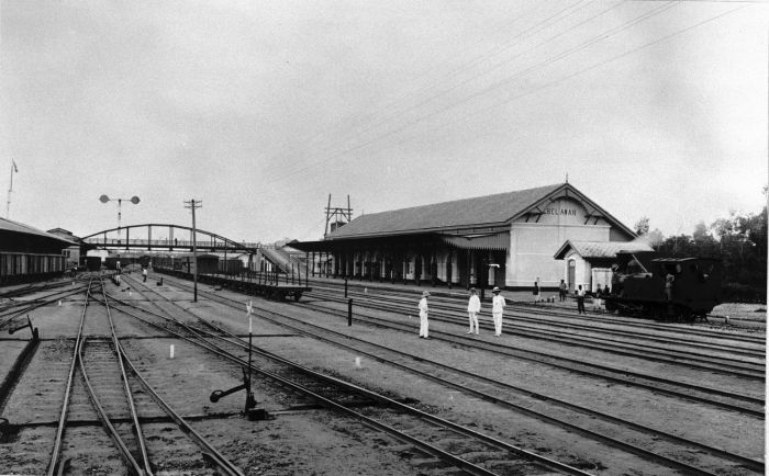 Foto. Het station van Belawan, oostkust Sumatra